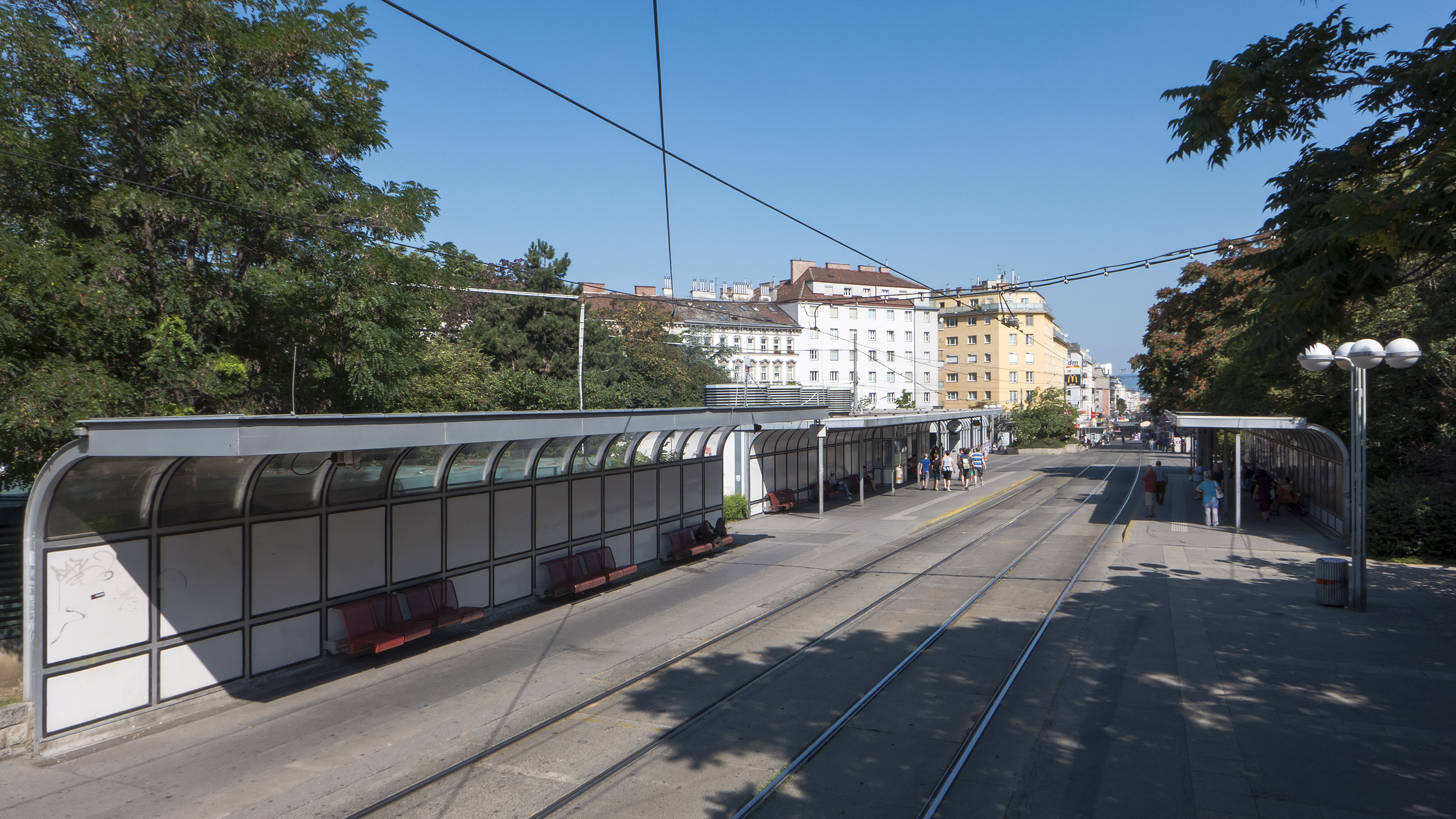 Reumannplatz in Wien 10 Richtung Norden